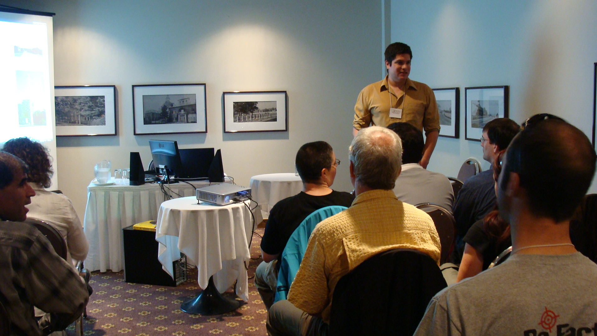 Photo de la conférence « Projets pédagogiques sur Wikipédia » qui a eu lieu à la salle Des Chenaux de l'hôtel Delta à Trois-Rivières (Québec) le 5 juin 2009 de 8h30 à 9h.